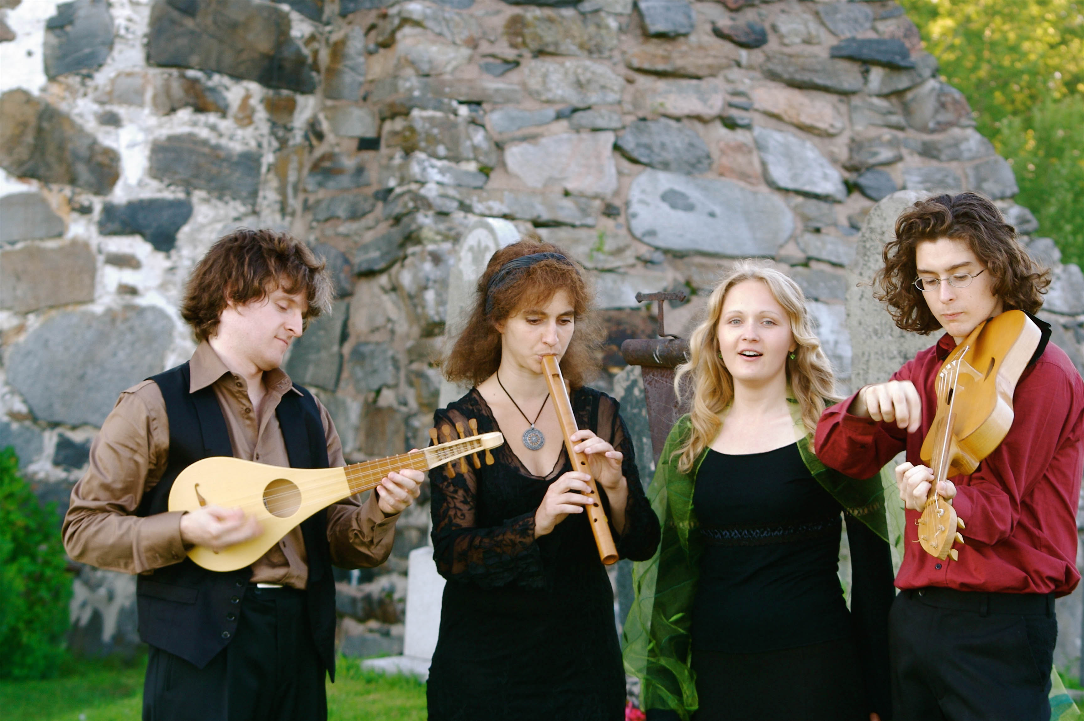 Keskiaikaisen musiikin yhtye La Morra Sastamala Gregoriana -festivaaleilla